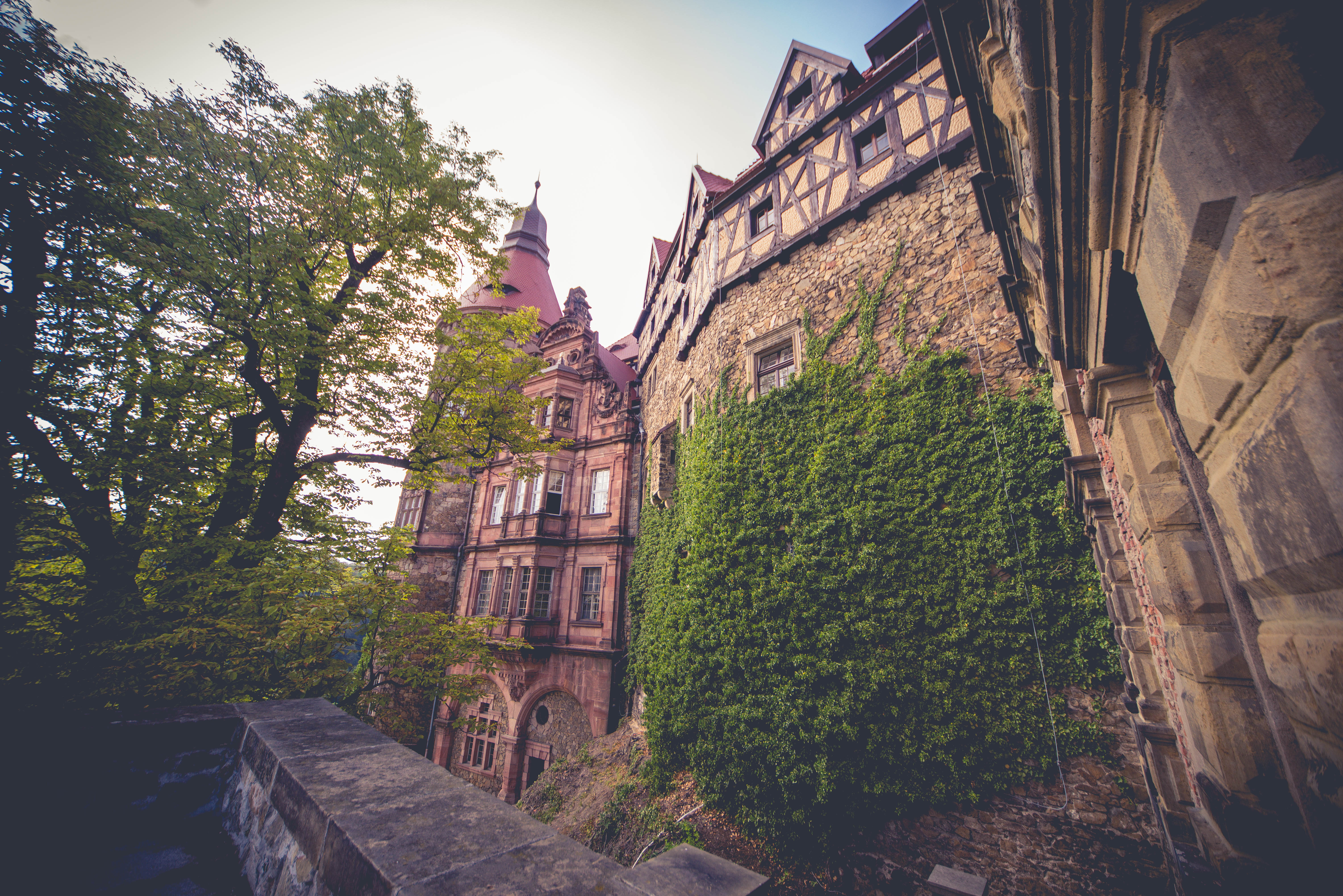 Zespół rezydencjalny znajdujący się w Wałbrzychu.